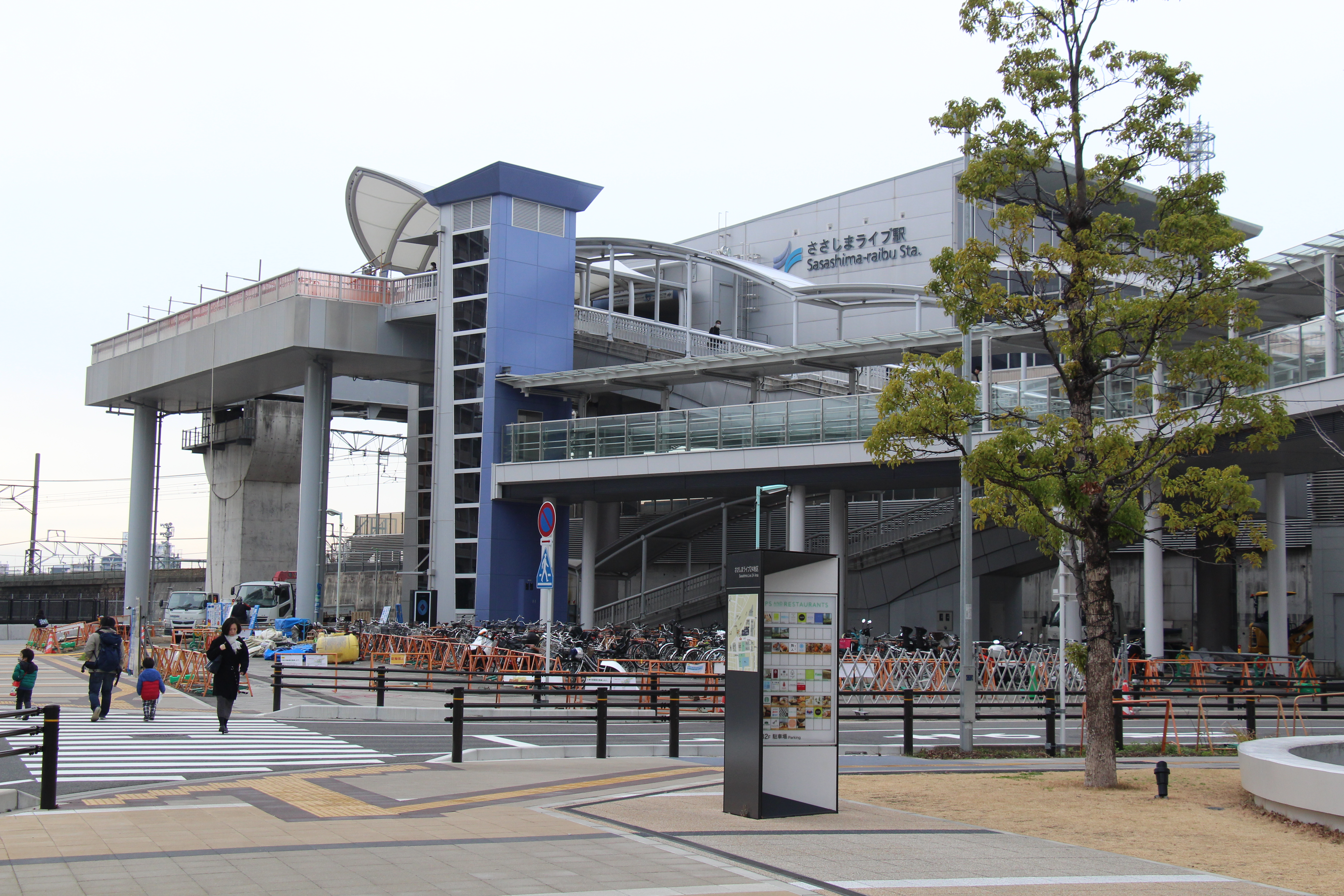 ささしまライブ駅舎外観を東側から撮影した。